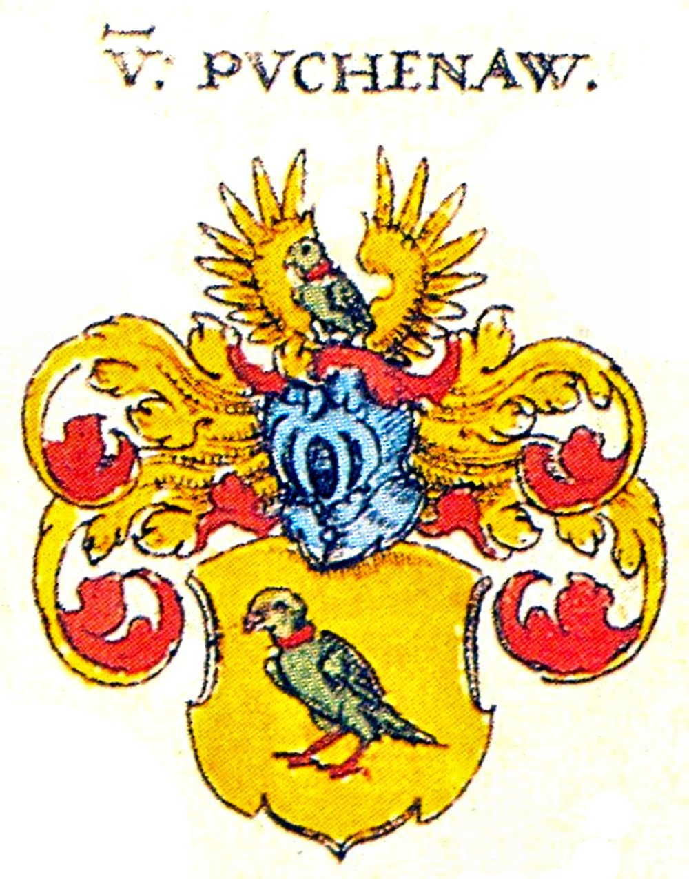 Wappen der Hessischen Adelsfamilie Buchenau